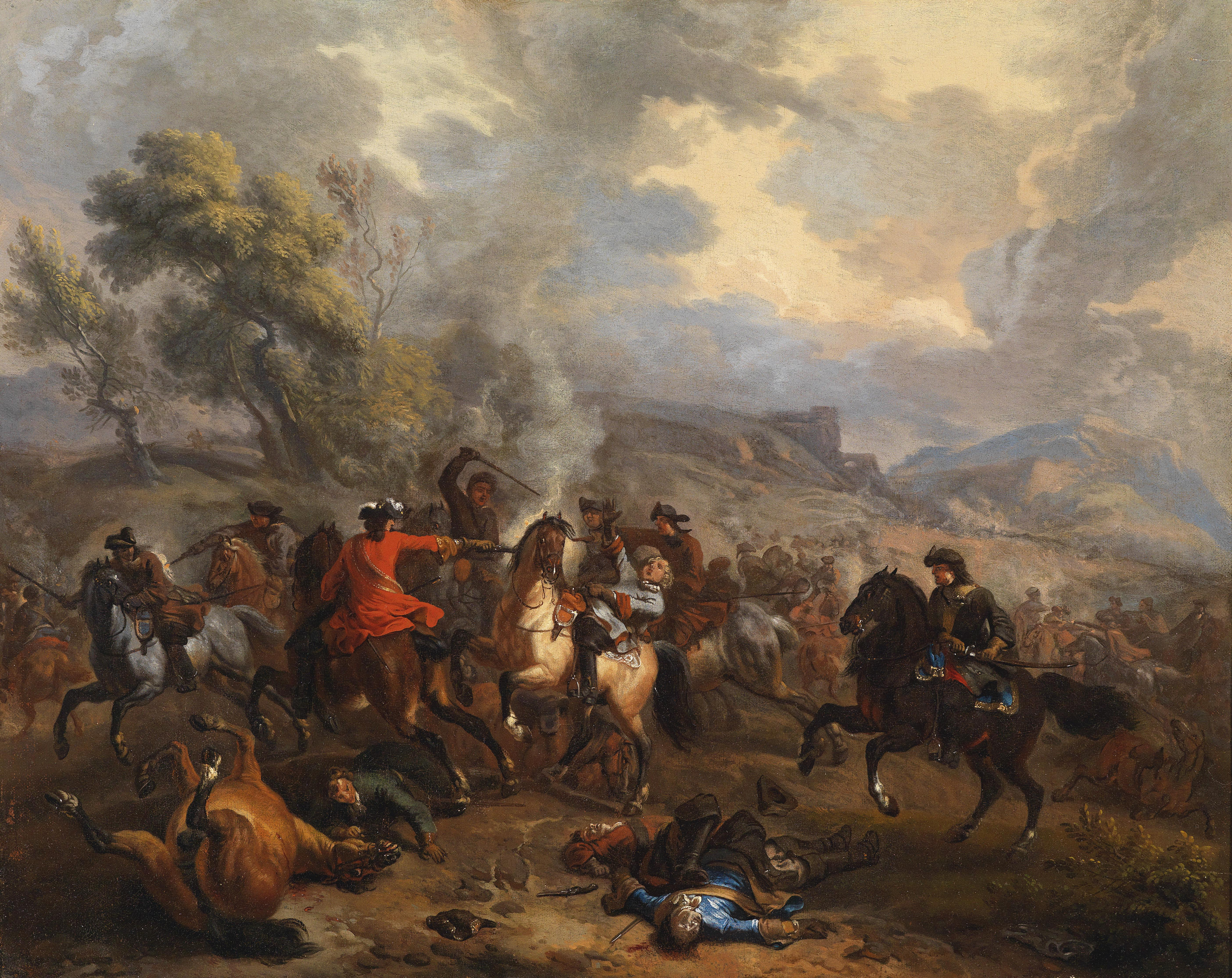 Reitergefecht aus der Zeit des Spanischen Erbfolgekriegs